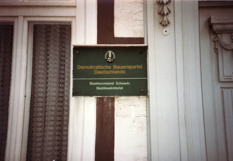 Schild an der Hauswand: Demokratische Bauernpartei Deutschlands, Bezirksvorstand Schwerin